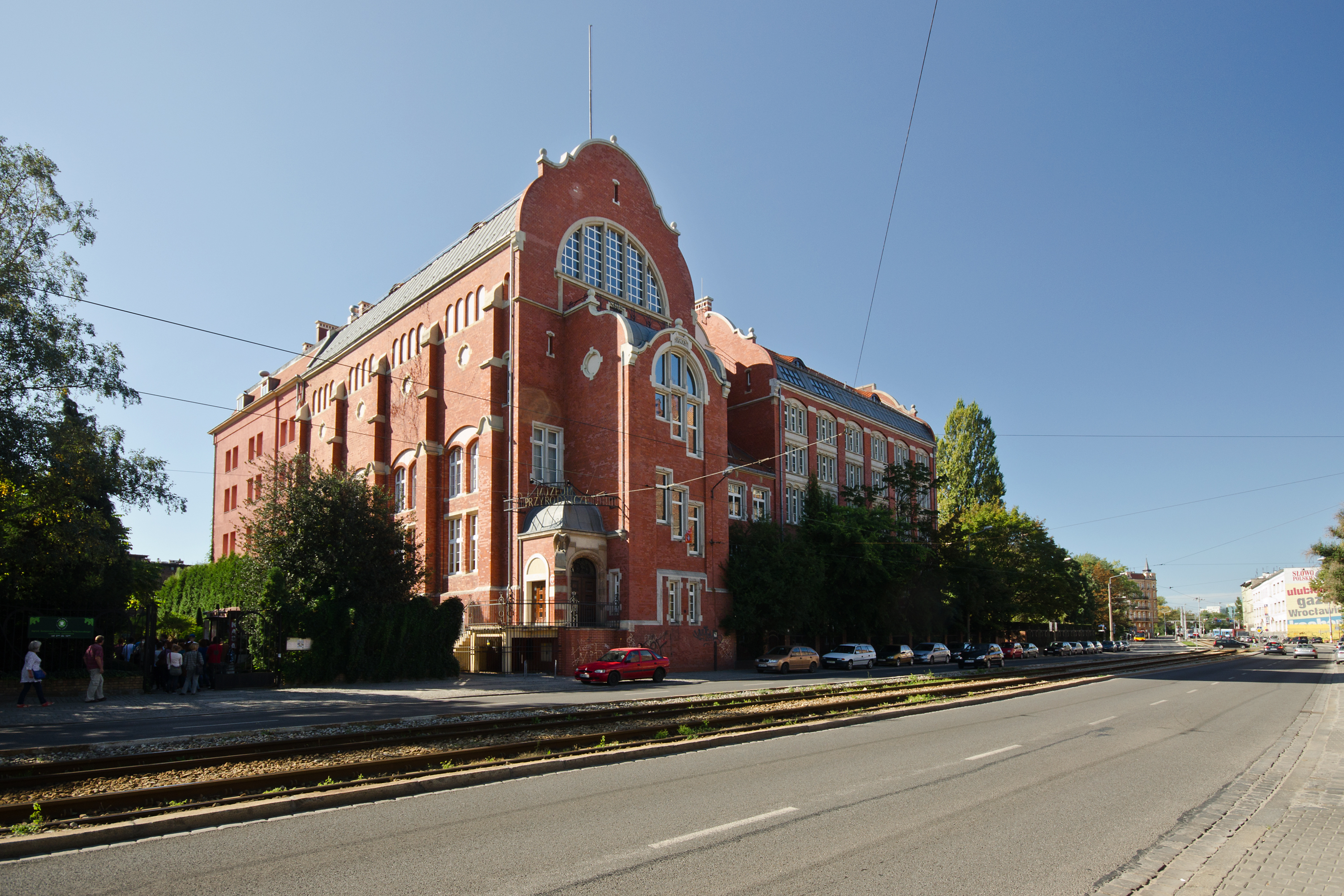 Instytut Zoologiczny Uniwersytetu Wrocławskiego Sienkiewicza 21, Miasto Wrocław - Śródmieście